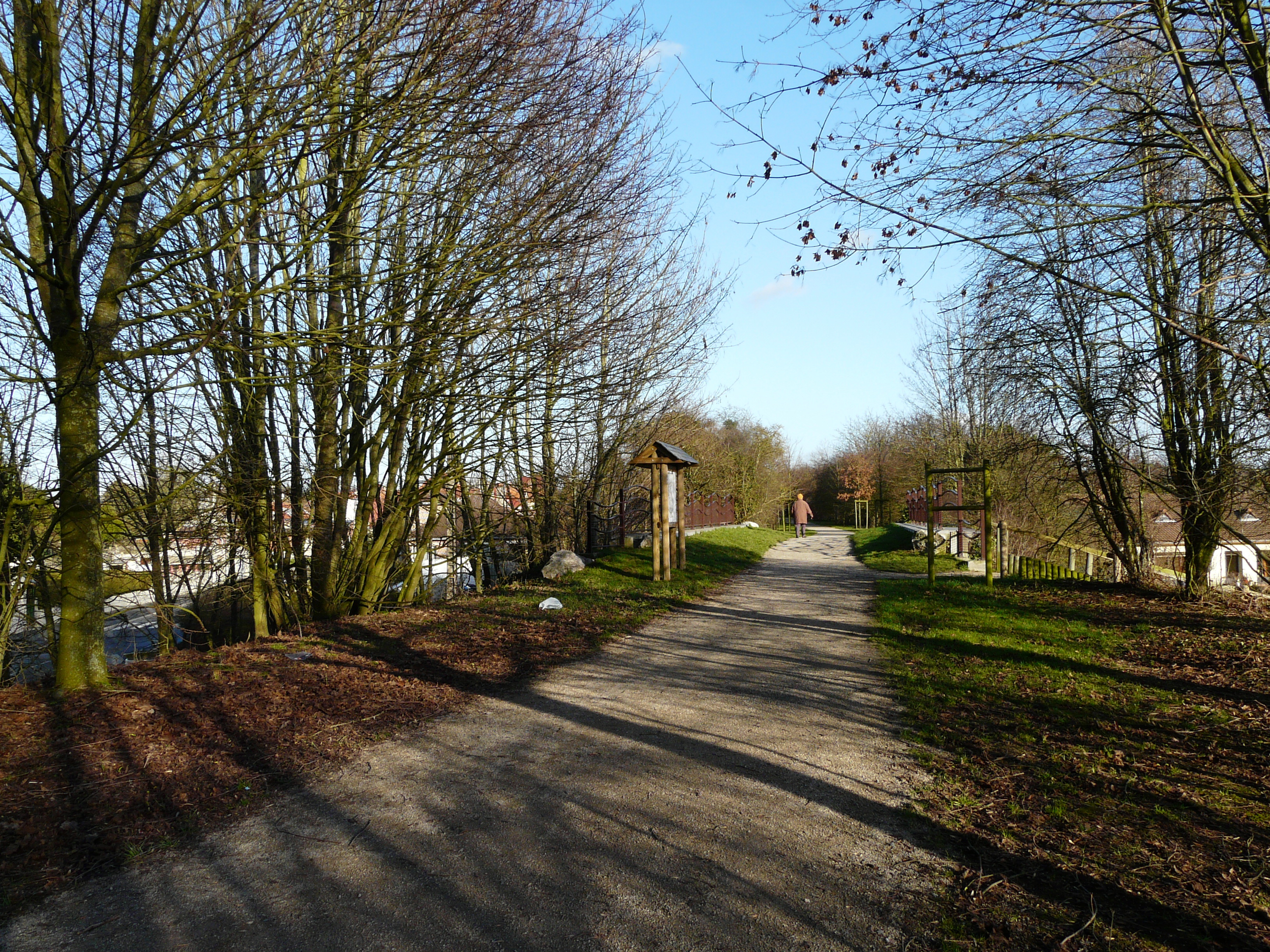 Circuit pédestre aménagé sur le tracé de l'ancienne ligne de chemin de fer vers Cambrai